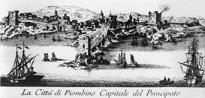 Incisione del 1600.